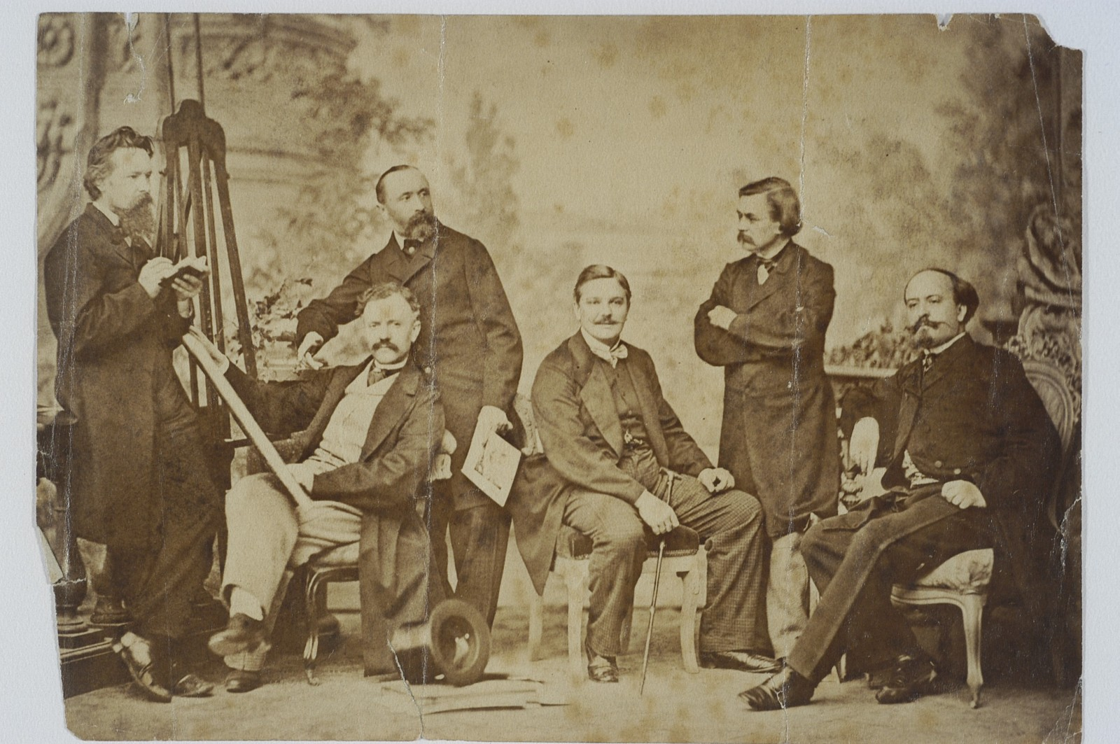 Stoją od lewej: Wojciech Gerson, Józef Simmler, Alfred Schouppe. Siedzą od lewej: Józef Brodowski, Franciszek Kostrzewski, Juliusz Kossak